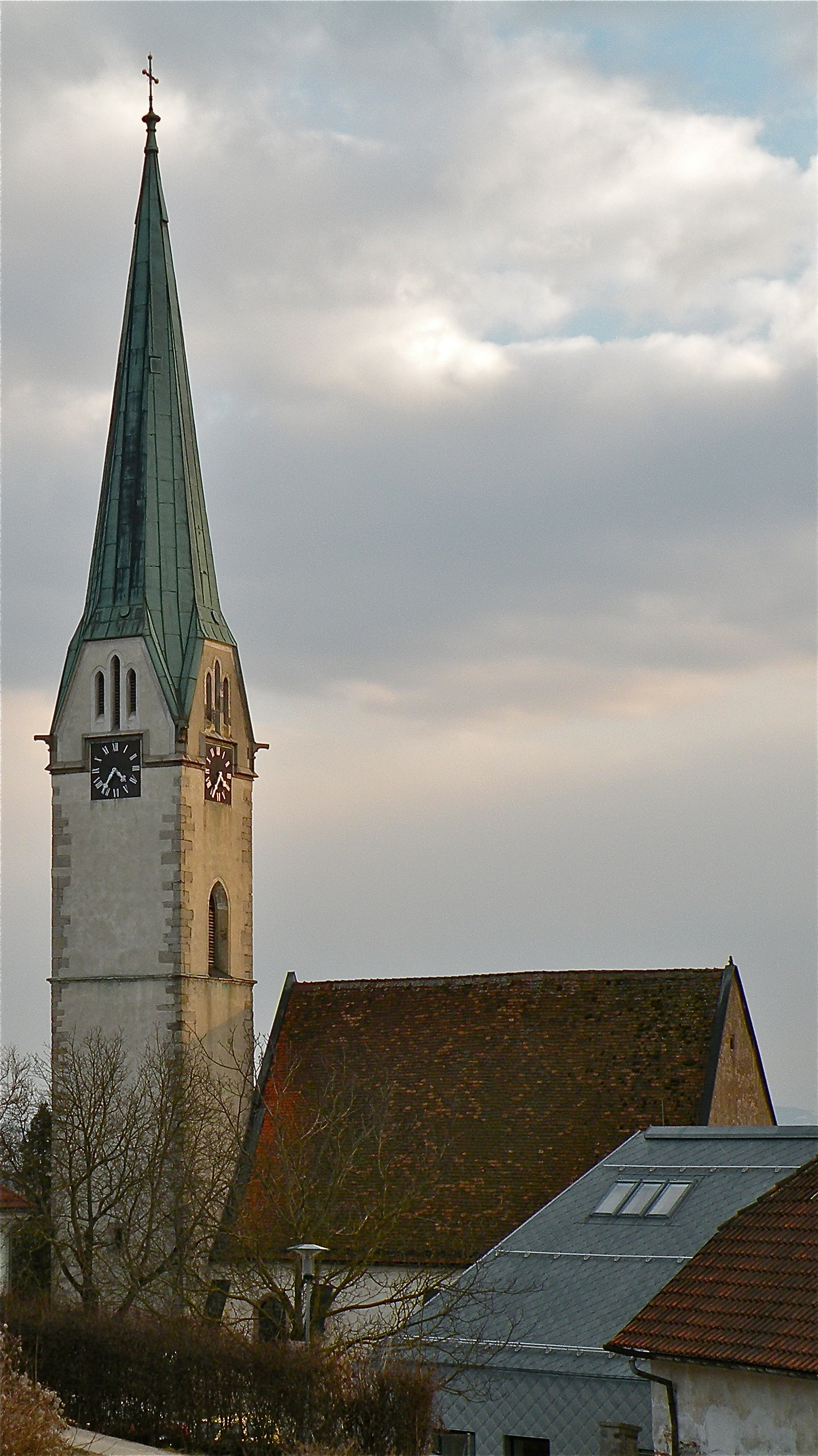 Pfarrkirche in Mauthausen